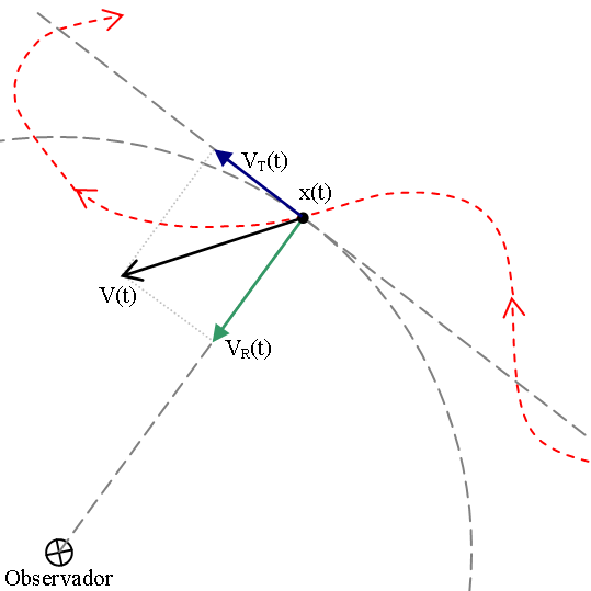 Muestra a relación entre la velocidad de un objeto y sus componentes radial y transversal con respecto a un observador. -Velocidad radial- -Radial velocity- -Vitesse radiale- -Radialgeschwindigkeit